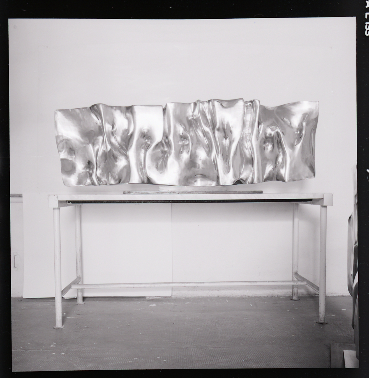 Servizio fotografico : Italia, 1965 / Paolo Monti. - Buste: 9, Fototipi: 18 : Negativo b/n, gelatina bromuro d'argento/ pellicola ; 6x6. - ((Serie costituita da 9 buste sciolte di negativi identificati con i nn.: 11827, 11828, 11829, 11830, 11831, 11832, 11833, 11834, 11835. - Ogni busta contiene 2 negativi identificati con lo stesso numero di inventario. - La suddetta serie è contenuta nella scatola G11501-12000, formato 24x30. - Occasione: Documentazione delle opere per la IX Quadriennale Nazionale d'Arte di Roma (Palazzo delle Esposizioni, Roma). - Fonte: Monografia di Ballo, Guido: Dalla poetica del segno alla presenza continua: Arnaldo e Giò Pomodoro, Milano, Luigi Maestri Editore (1962). - Fonte: Agenda di Paolo Monti: Monti/ 2/ 6 giugno 1964 - 31 marzo 1966/ 8194-12420 (1964-1966), presso Archivio Paolo Monti